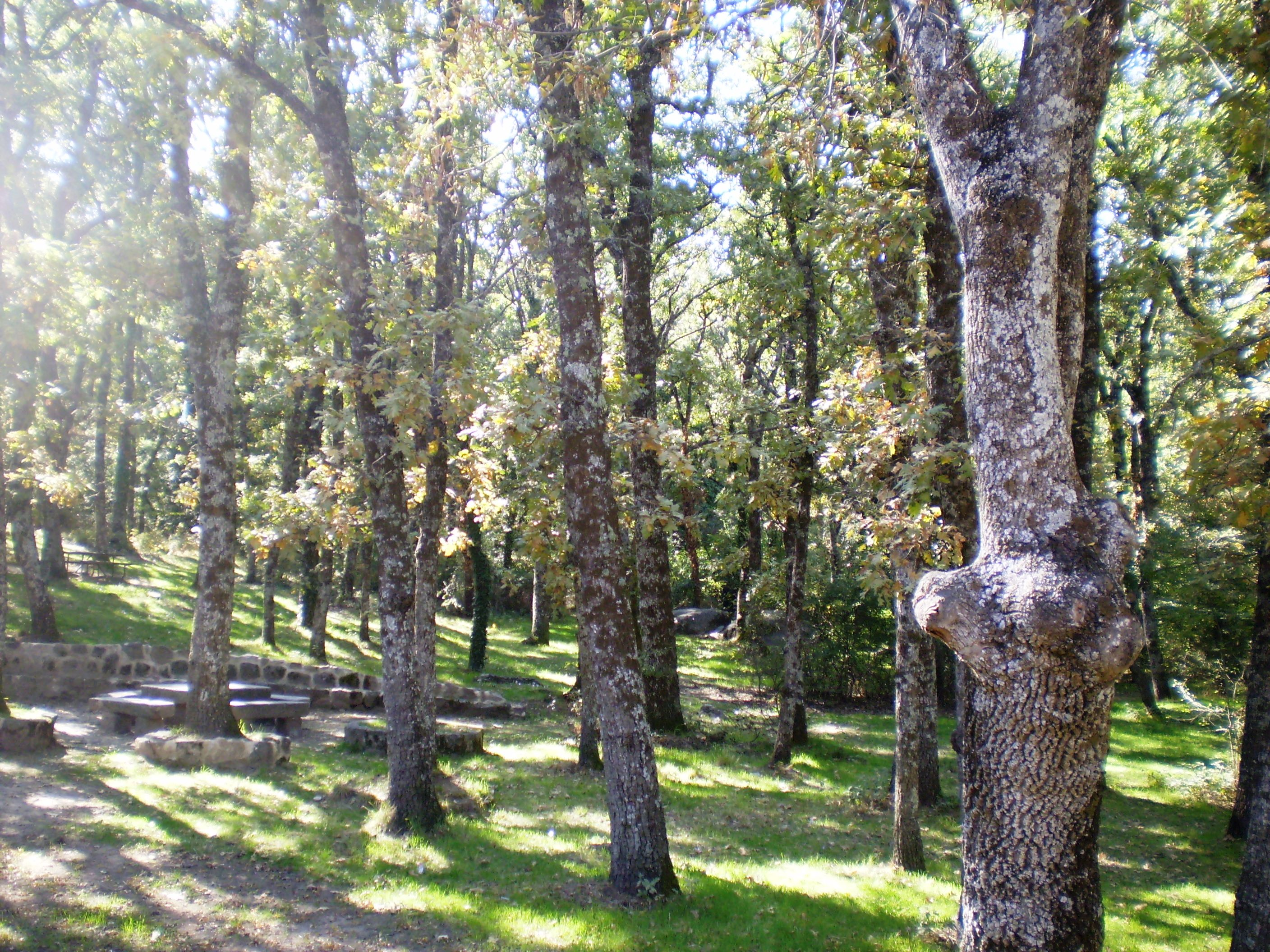 Paraje Pintoresco del Pinar de Abantos y Zona de La Herrería. San Lorenzo de El Escorial. Community of Madrid, Spain